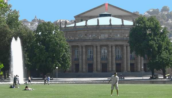 Stuttgart, Germany: Württembergische Staatstheater, Großes Haus (Württembergische Staatsoper)